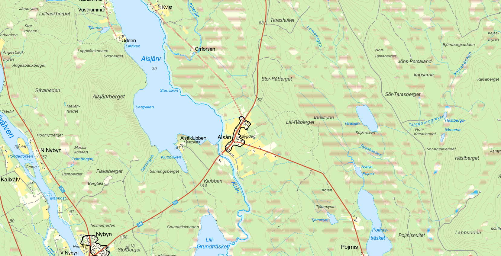 Småorten Alsån med gränserna från Statistiska centralbyråns småortsavgränsning 2010. Bakgrundskarta från Lantmäteriet, skala 1:30 236.